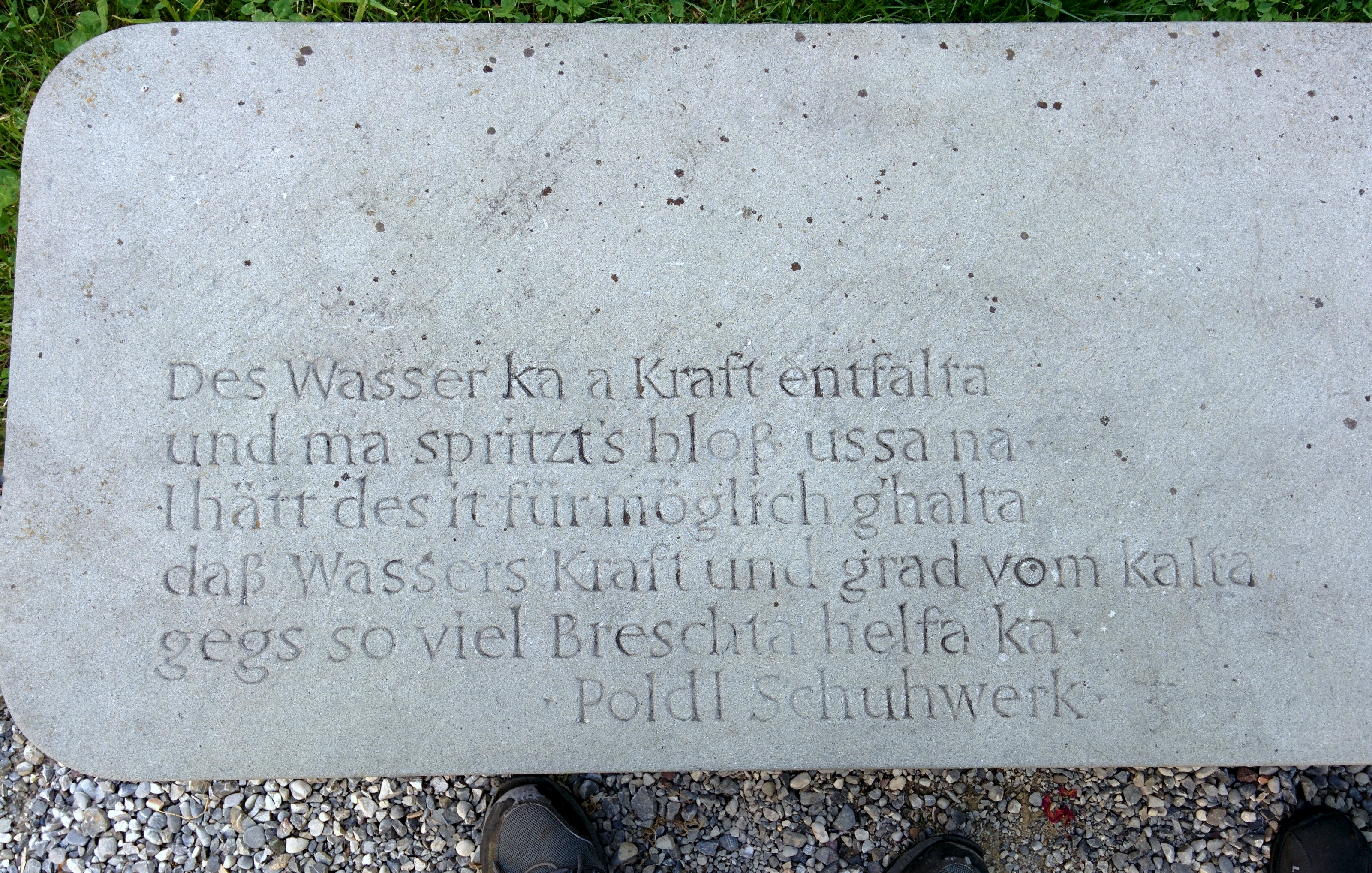 Stein mit Gedicht von Luitpold (Poldl) Schuhwerk am Kneipp-Becken im Schlossgarten Türkheim